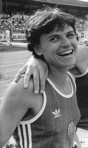 Dagmar Rübsam ADN-ZB Kluge 3.6.84 Erfurt: 35. DDR-Meisterschaften in der Leichtathletik- Weltrekord- Am Schlußtag der Meisterschaften stellte die 4x 400-m-Staffel der Frauen-Nationalmannschaft in der Besetzung Dagmar Rübsam, Gesine Walther, Marita Koch und Sabine Busch (vlnr) mit 3:15,92 einen neuen Weltrekord auf.